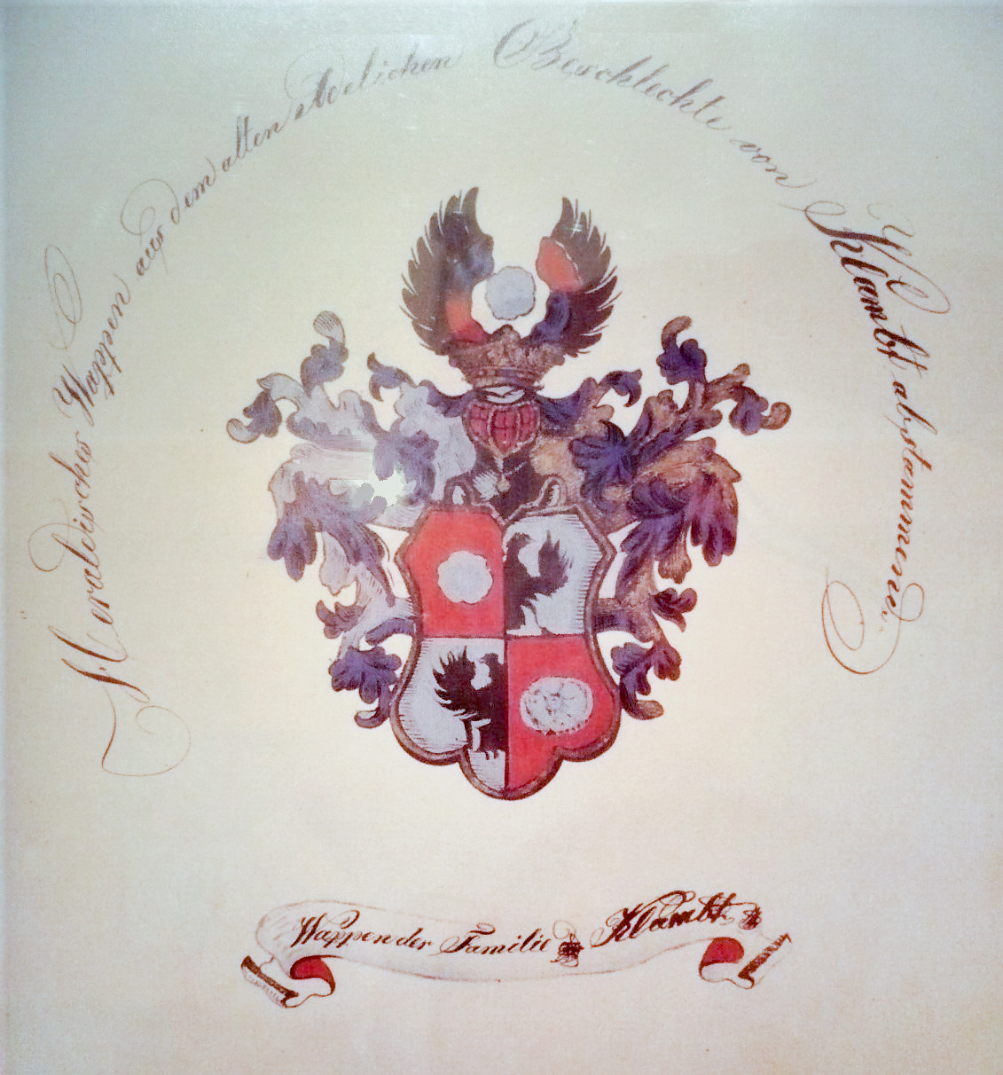 Herb Klambtów